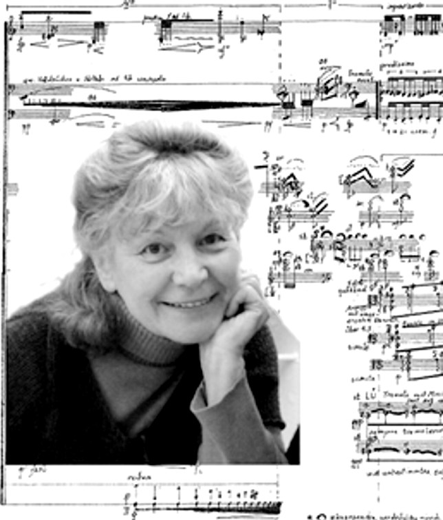 Viera Janárceková